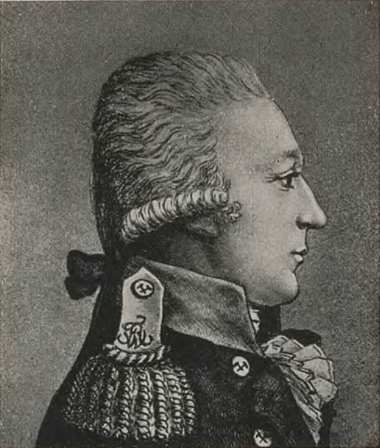 Friedrich Wilhelm von Reden (1752-1815) dyrektor Wyższego Urzędu Górniczego we Wrocławiu, a później minister w rządzie pruskim, zasłużony dla rozwoju przemysłu, szczególnie na wschodnim terenie Górnego Śląska.